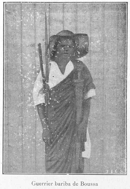 Guerrier bariba de Boussa